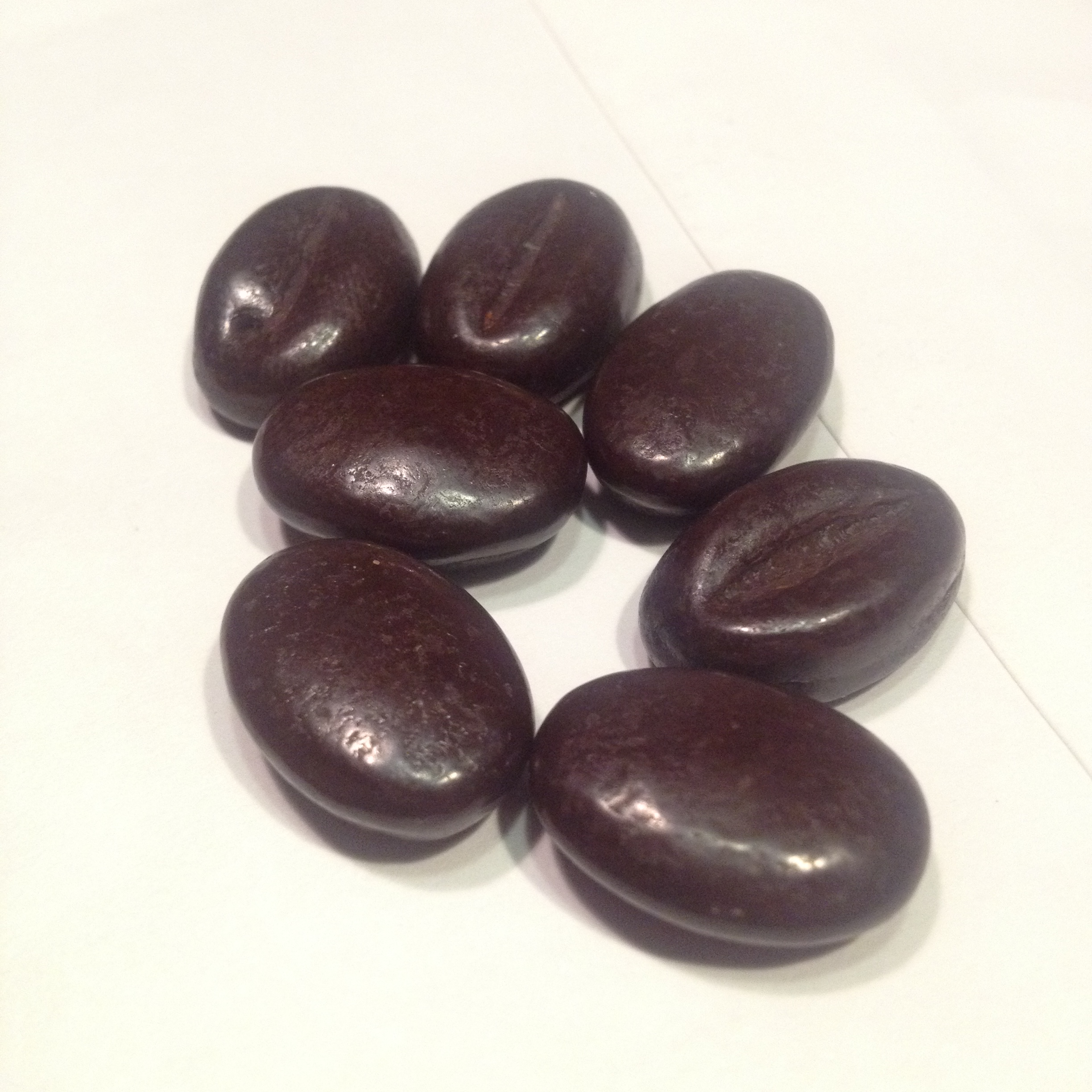 Freia Mokkabønner, fra en «Dessert Sjokolade»-boks